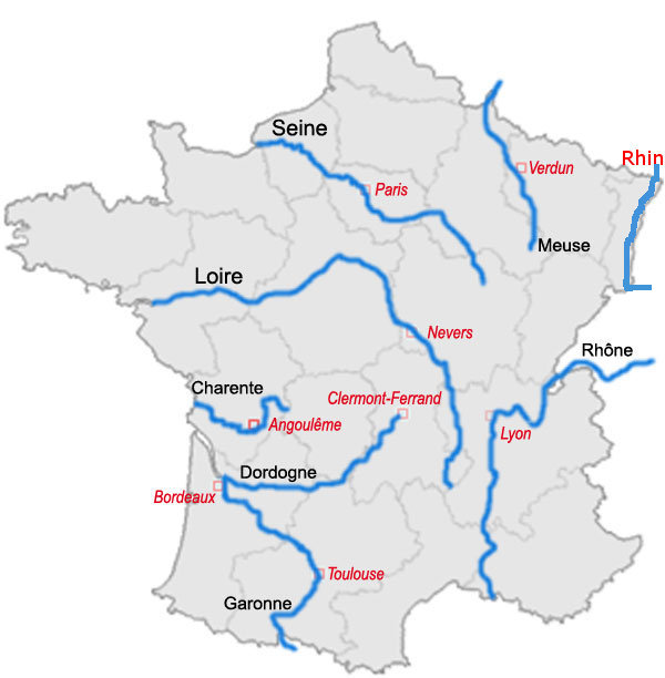 Carte des principaux fleuves français